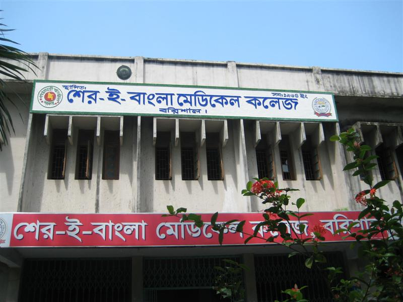 == লাইসেন্সকরণ ==